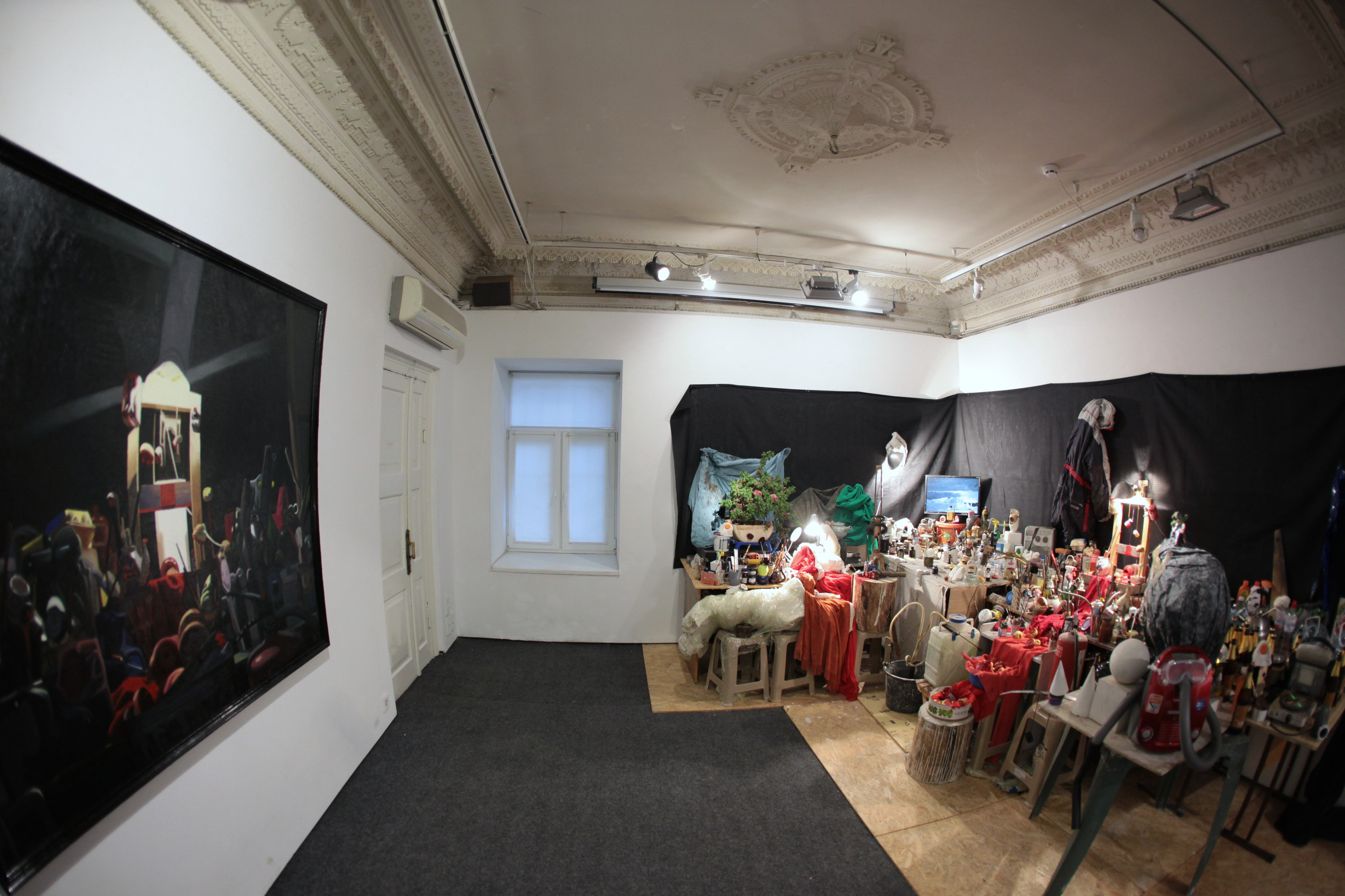 Карась Галерея. Експозиція виставки "Альбом Екзорцизм" Ігорь Канівець та Маргарита Шерстюк. 2017 рік.